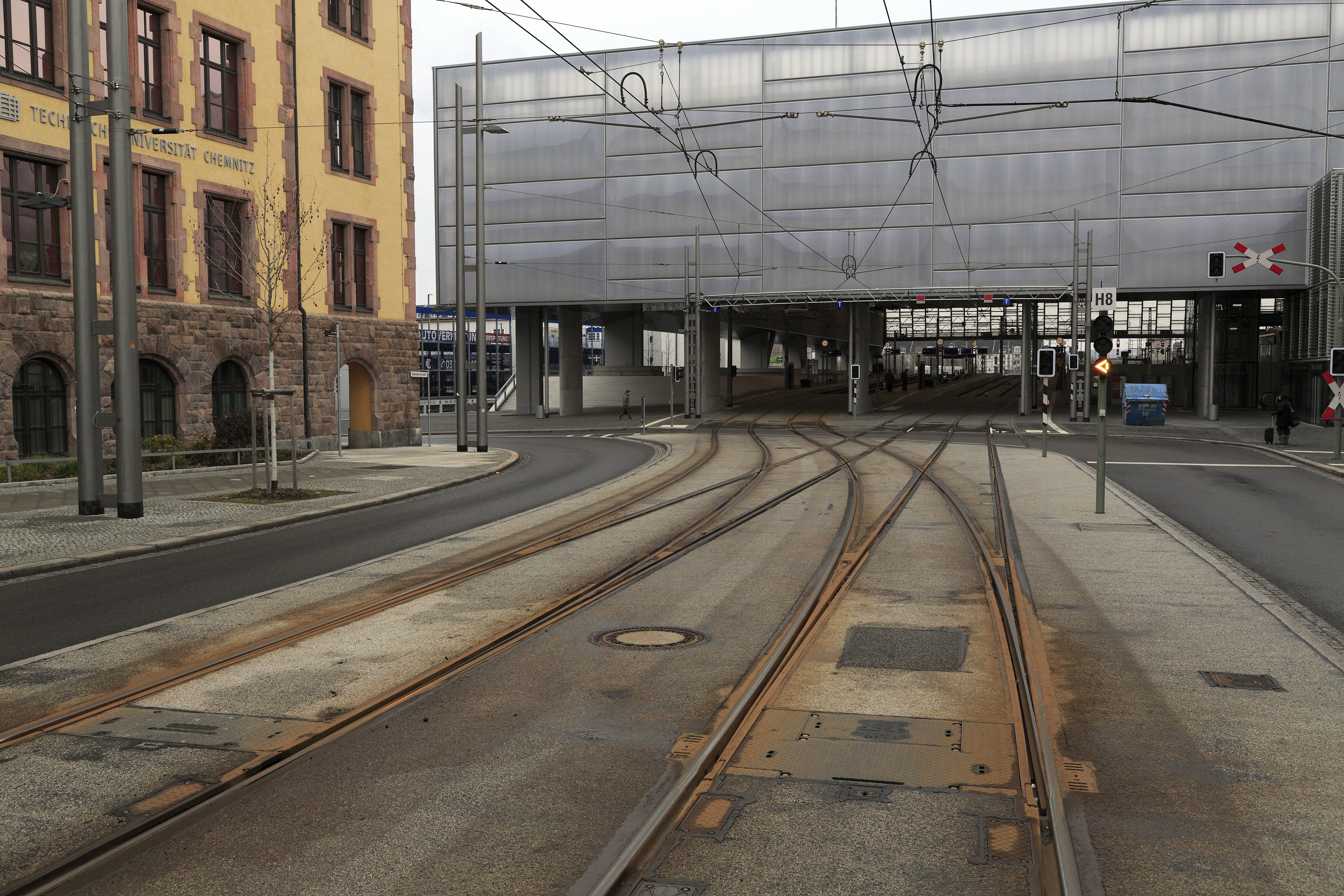 Die Rillenschienen haben mit Ausnahme der Zungenvorrichtungen sowie der Herzstücke und Radlenker Fernbahnmaße. Die beiden linken Gleise sind die Straßenbahnwendeschleife Chemnitz Hbf, die beiden rechten die Übergangsgleise zum Fernbahnnetz.